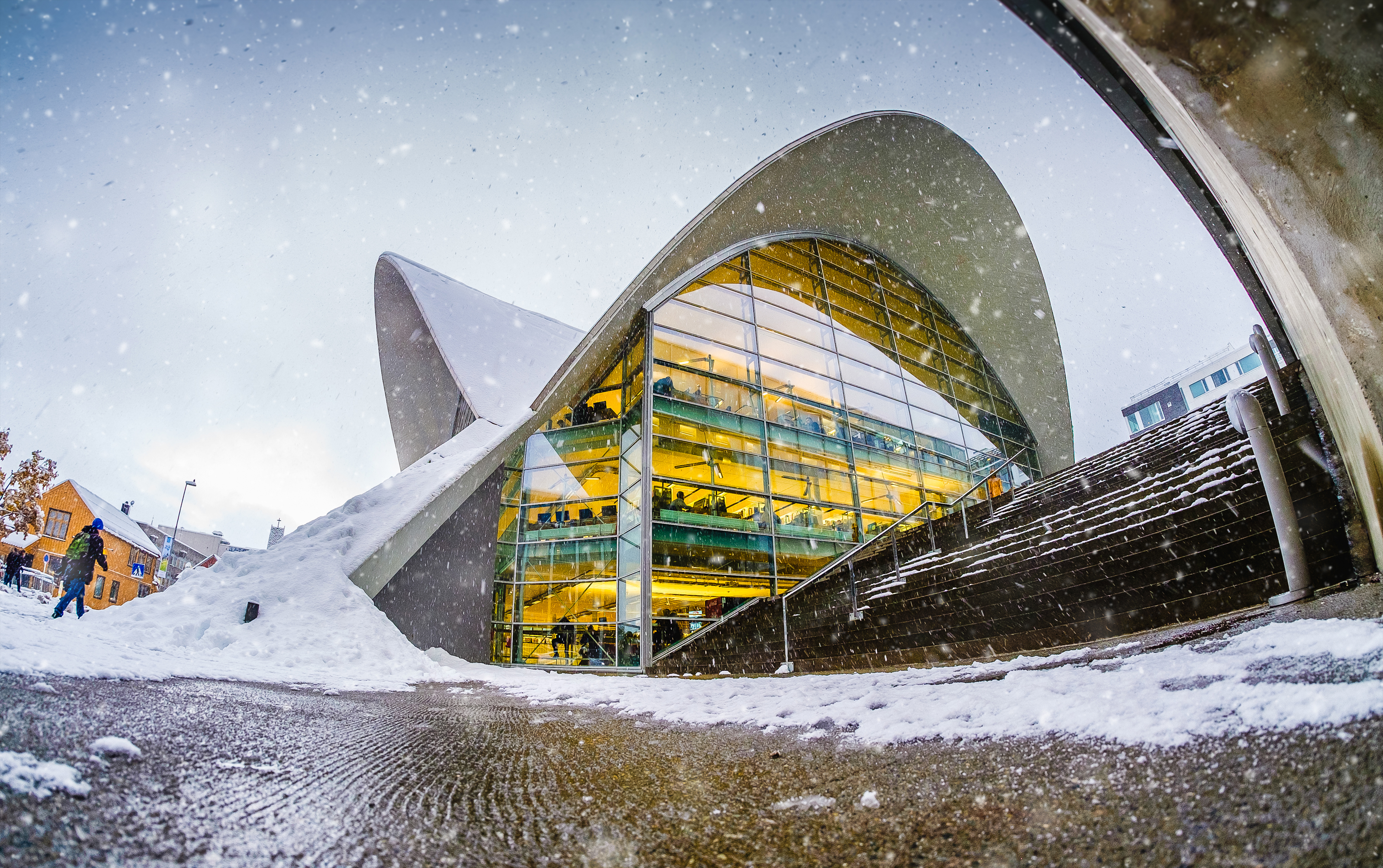 Snøen laver ned. Tromsø bibliotek og byarkiv.